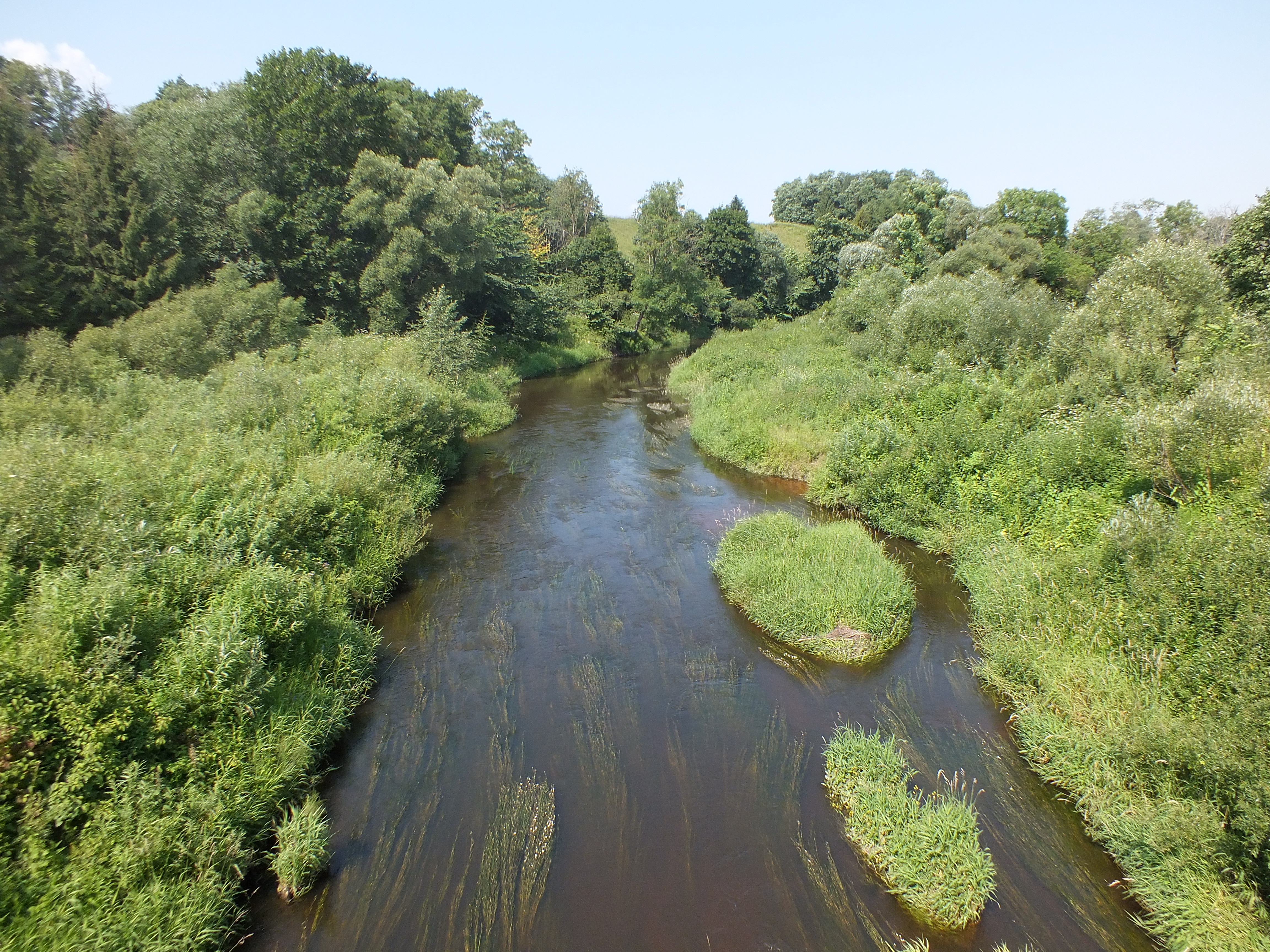 Širvinta ( ilgiausias Šventosios kairysis intakas 128,6 km )